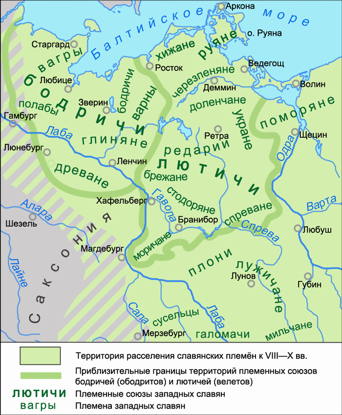 Карта размещения западнославянских племенных союзов бодричей (ободритов) и лютичей (велетов) в VIII—X вв. Карта из статьи "Полабские славяне" в БСЭ. Полабские славяне в 8—10 вв. Статья "Полабские славяне" в Большой Советской Энциклопедии Карта размещения племенных диалектов западных славян в 800—950 гг.